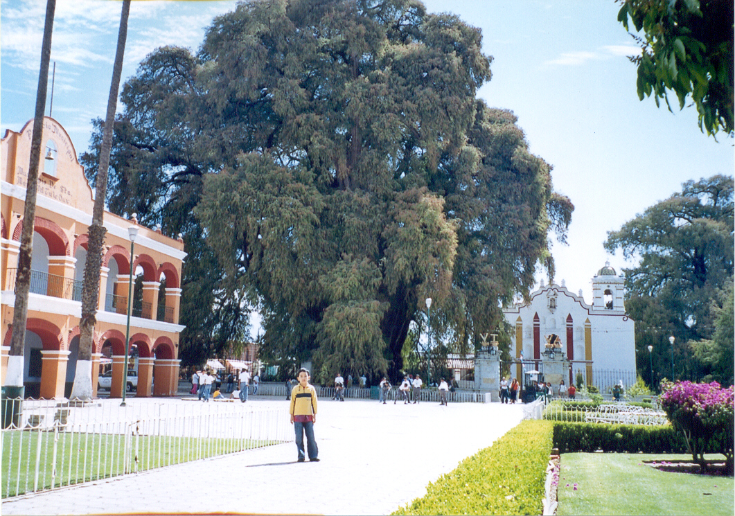 Arbol del Tule